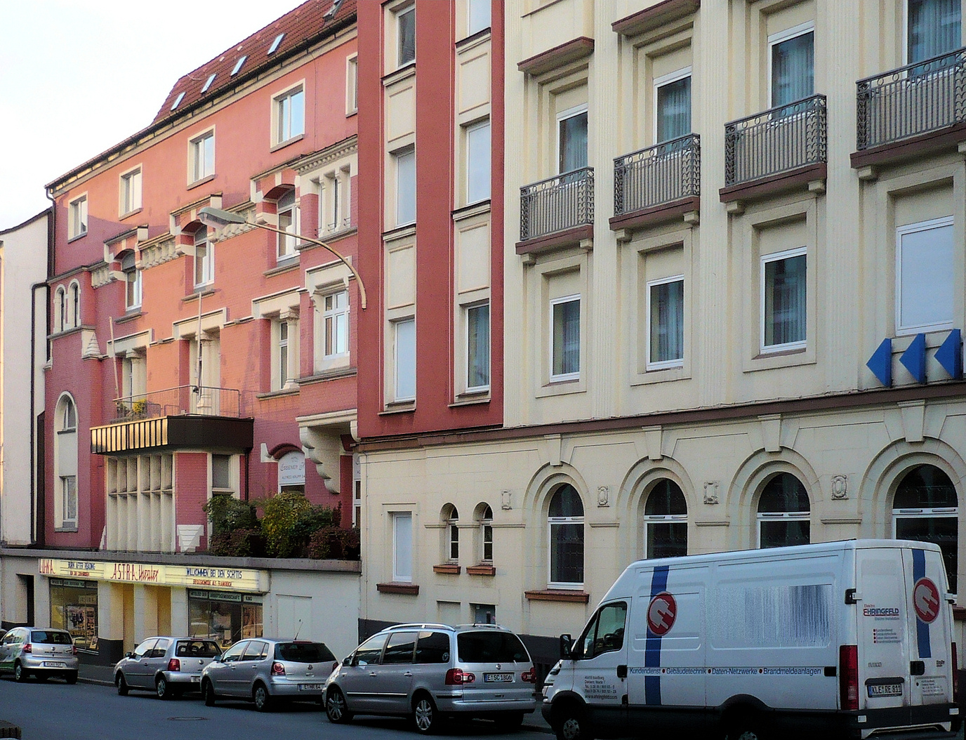 Hotel Essener Hof im Essener Zentrum, Seitenflügel mit Astra-Filmtheater